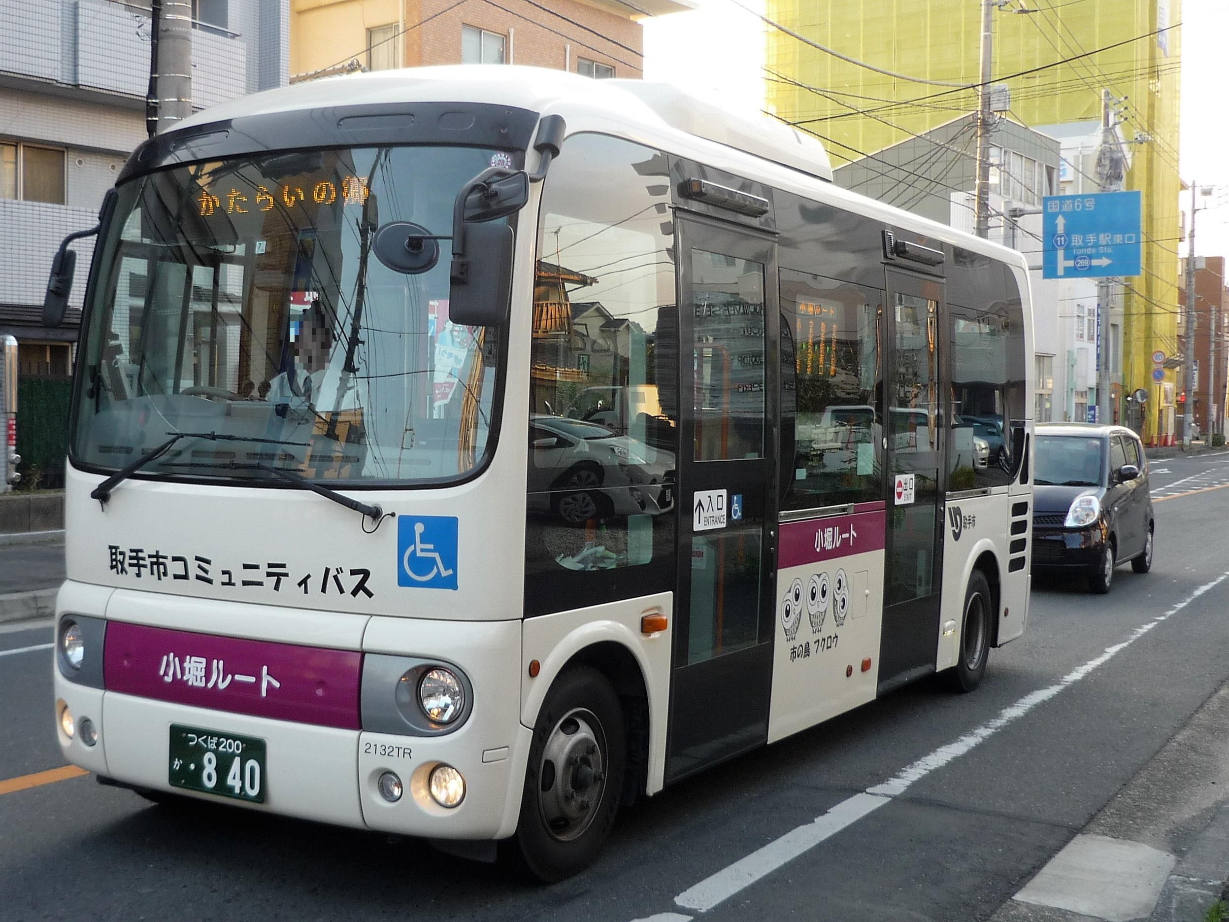 取手市コミュニティバス 小堀ルート Panasonic Lumix DMC-FS3